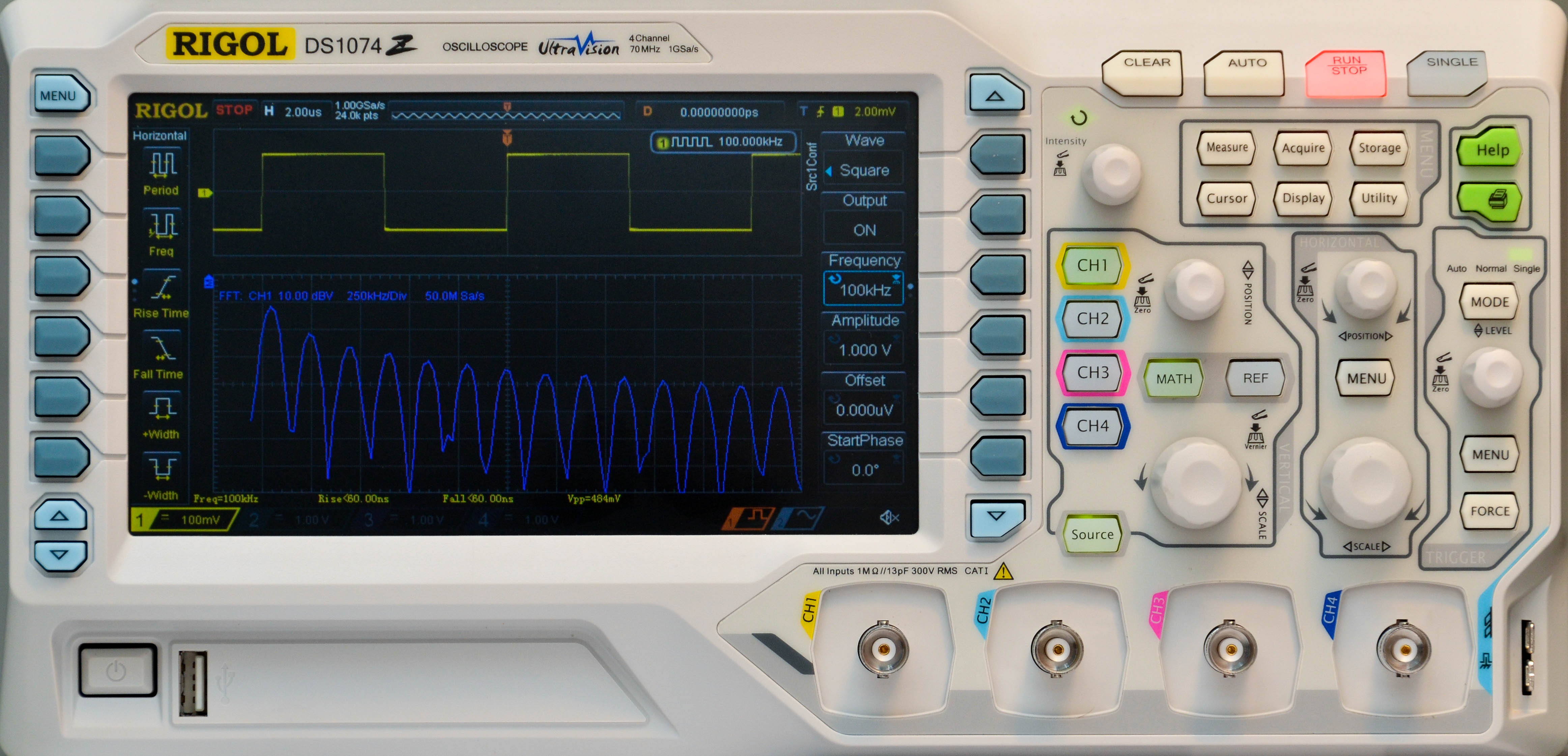 Voorzijde van werkende Rigol DS1074Z Oscilloscoop